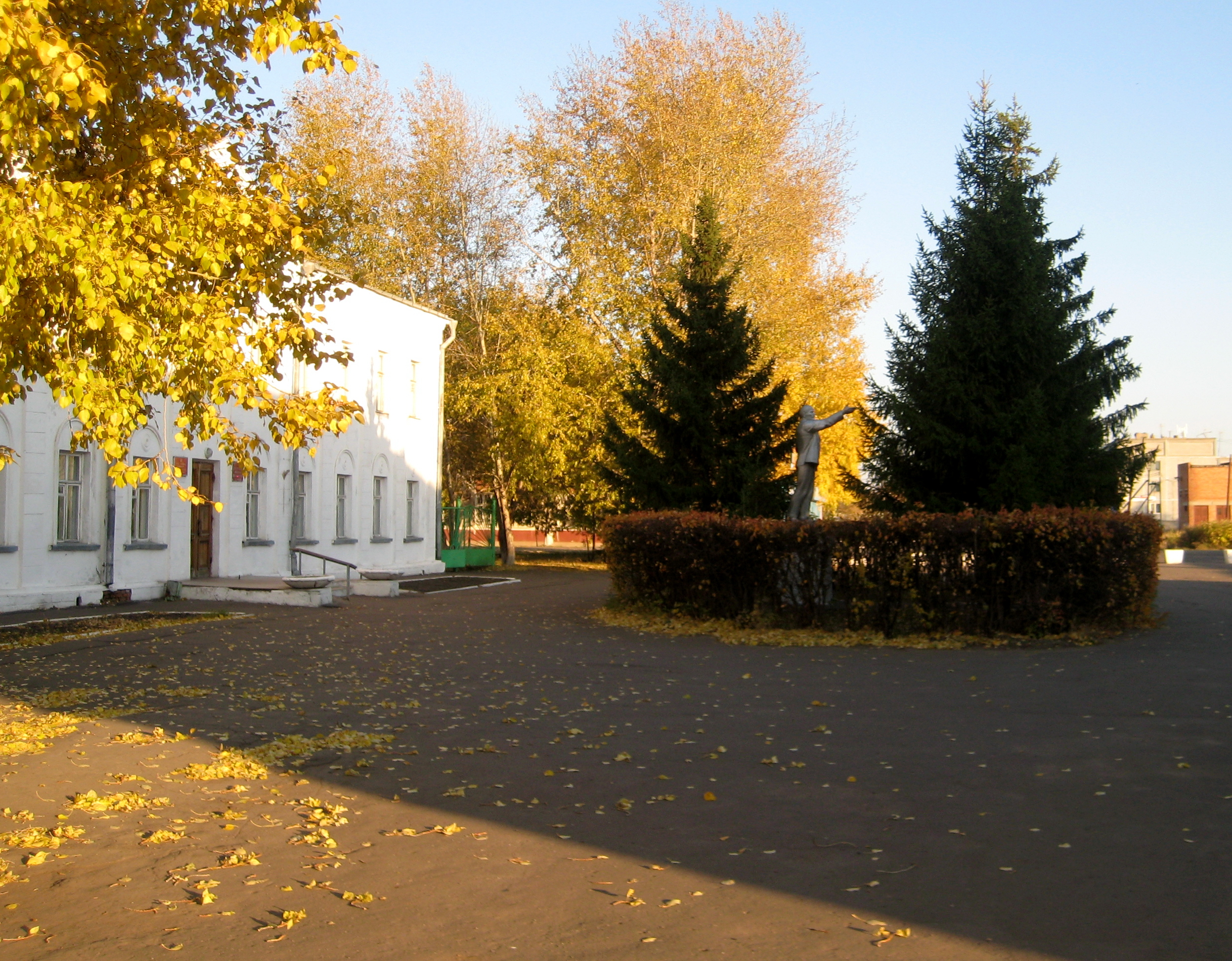 Музыкальная школа и памятник Ленину в п.г.т. Любино, Омская область, Россия